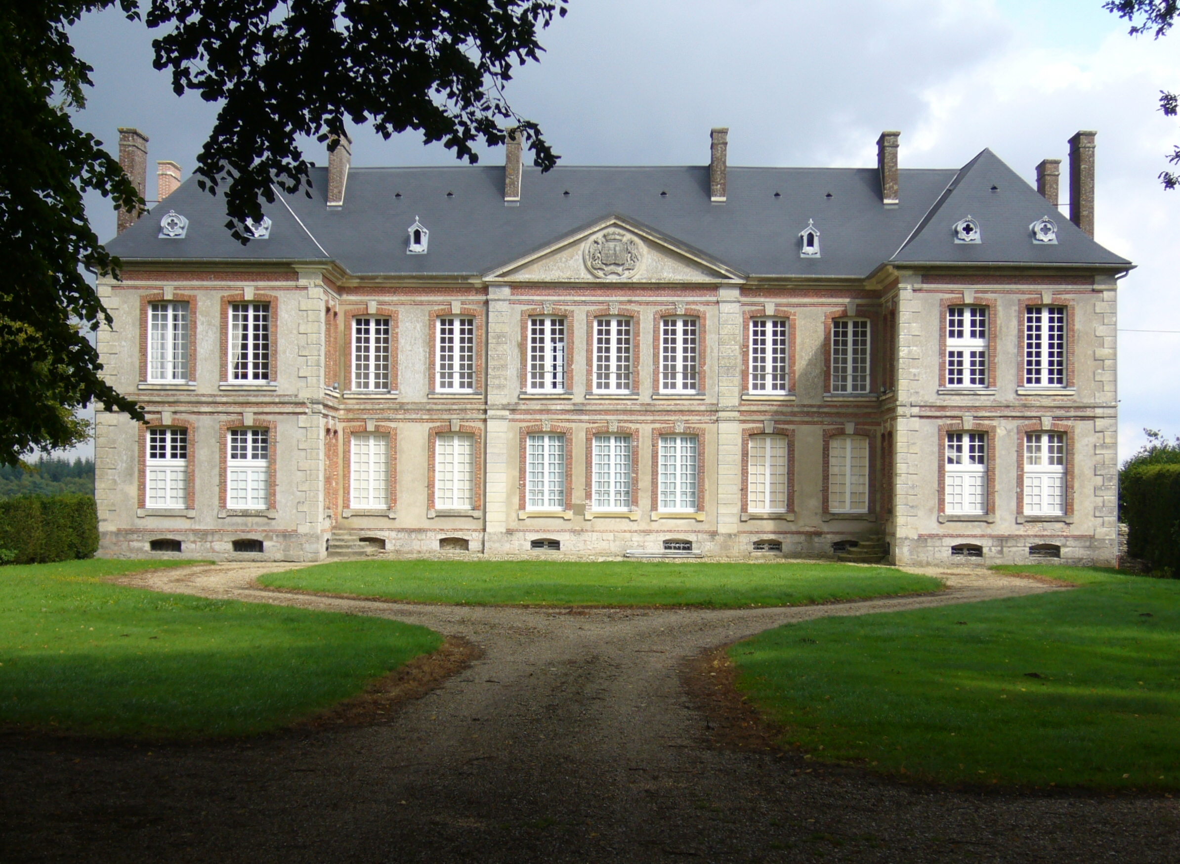 Chateau de Mercastel du XVIII, Commune de Villers-Vermont (Oise) France